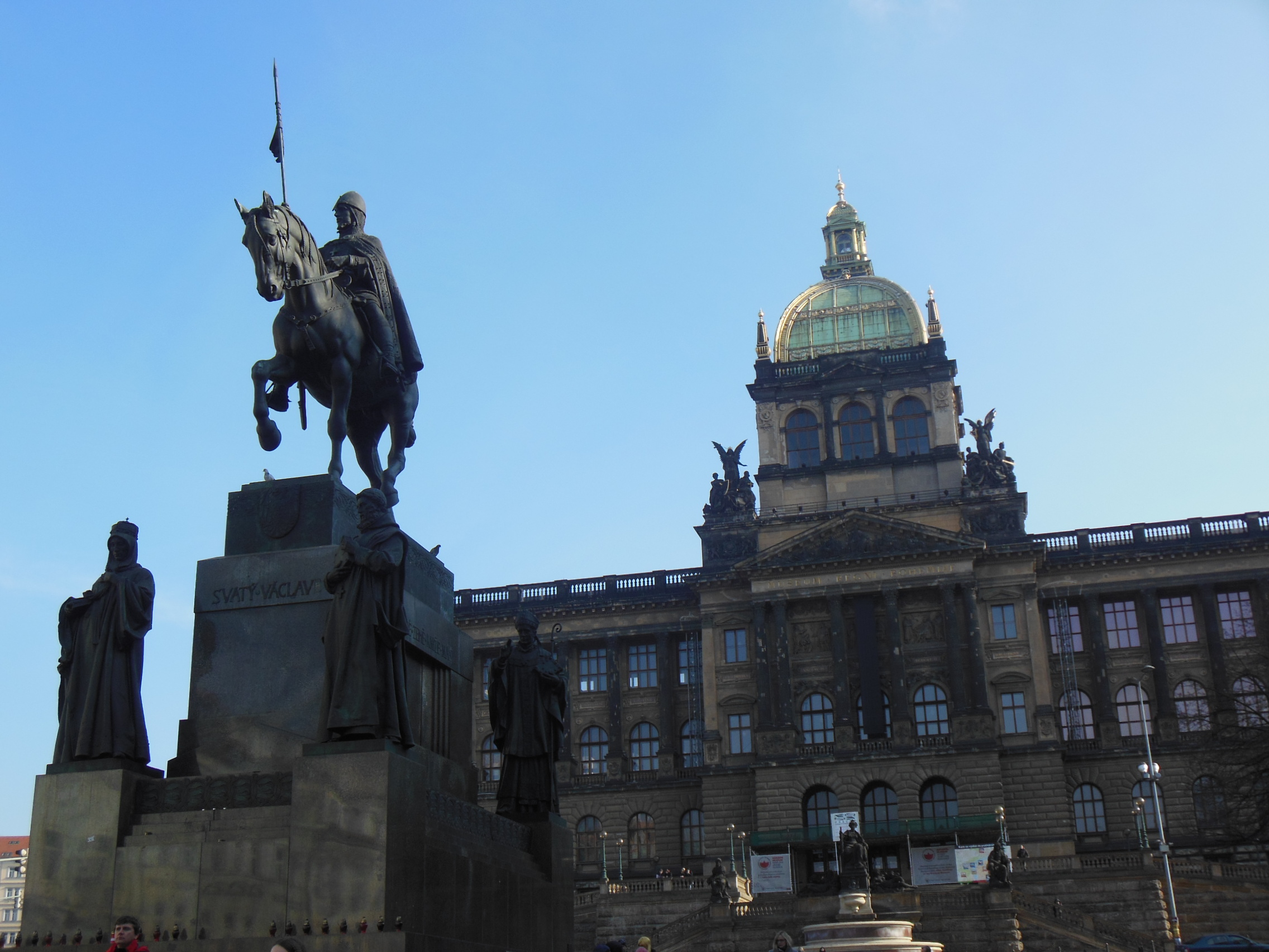 Praha-Nové Město. Pomník svatého Václava a Národní divadlo na Václavském náměstí.